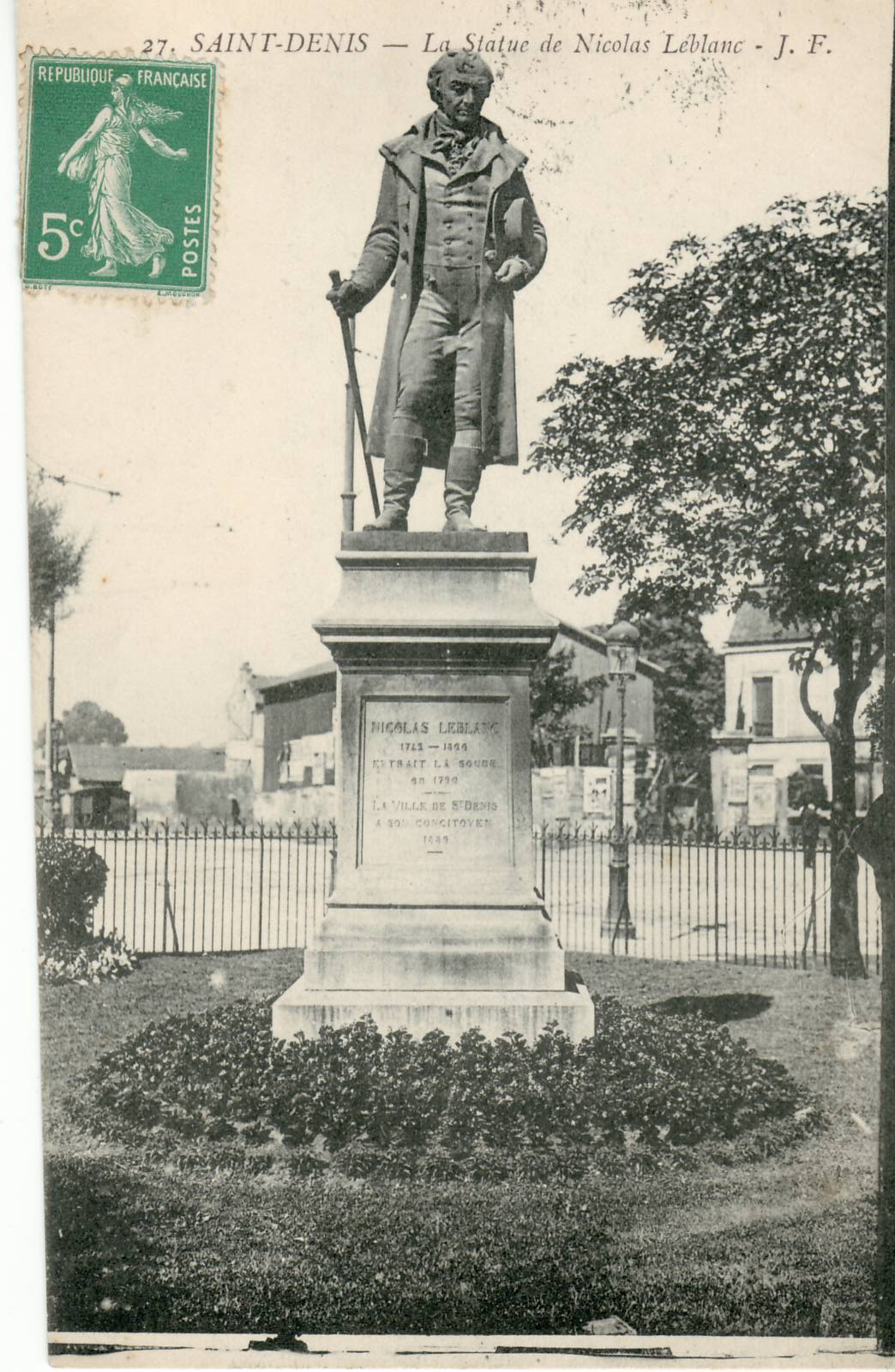 Carte postale ancienne, montrant la statue de Nicolas Leblanc implantée Porte de Paris à Saint Denis